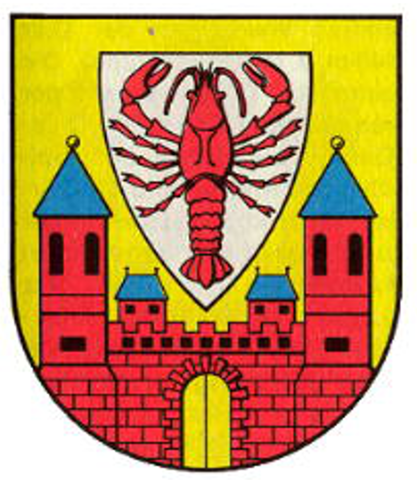 Wappen-Cottbus, Nach 1945